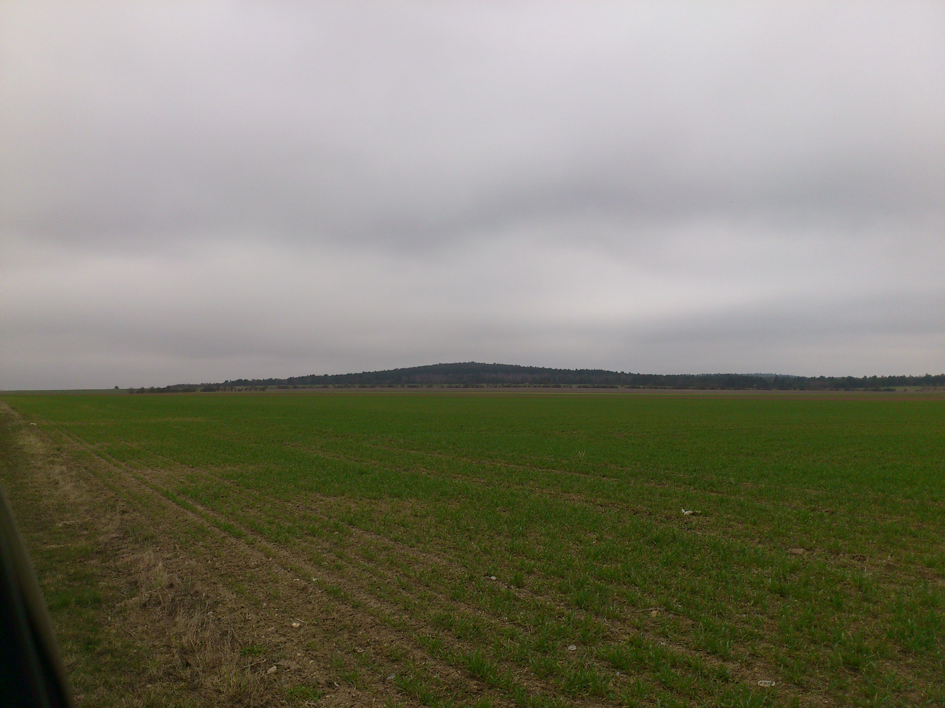 Photographie prise à Warmeriville dans le cimetière allemand où les corps des victimes du tunnel du Mont Cornillet (conflit 1914-1918)